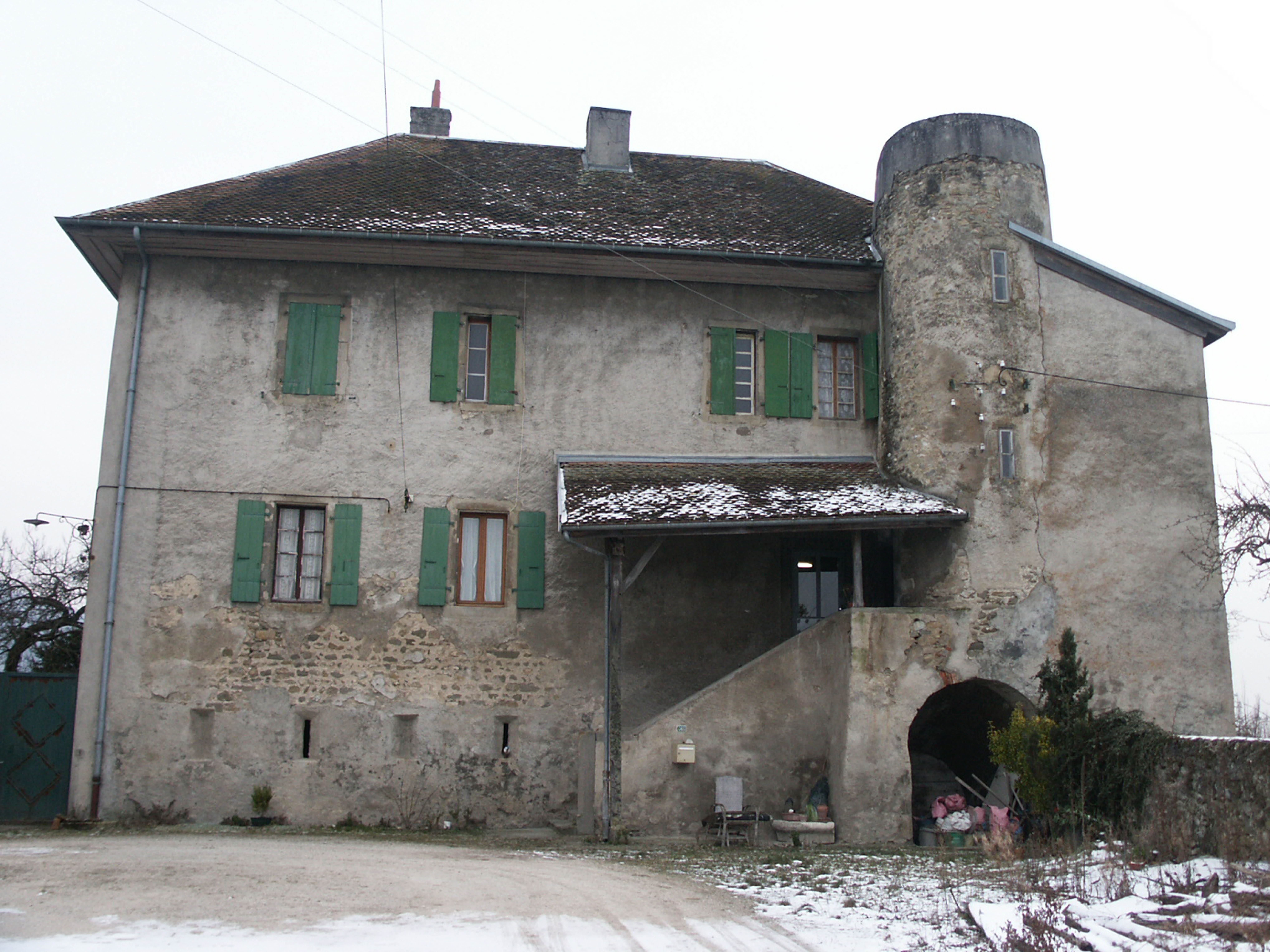 Château de Neydens, ancienne grange cistercienne de l'abbaye d'Aulps à Saint-Cergues.